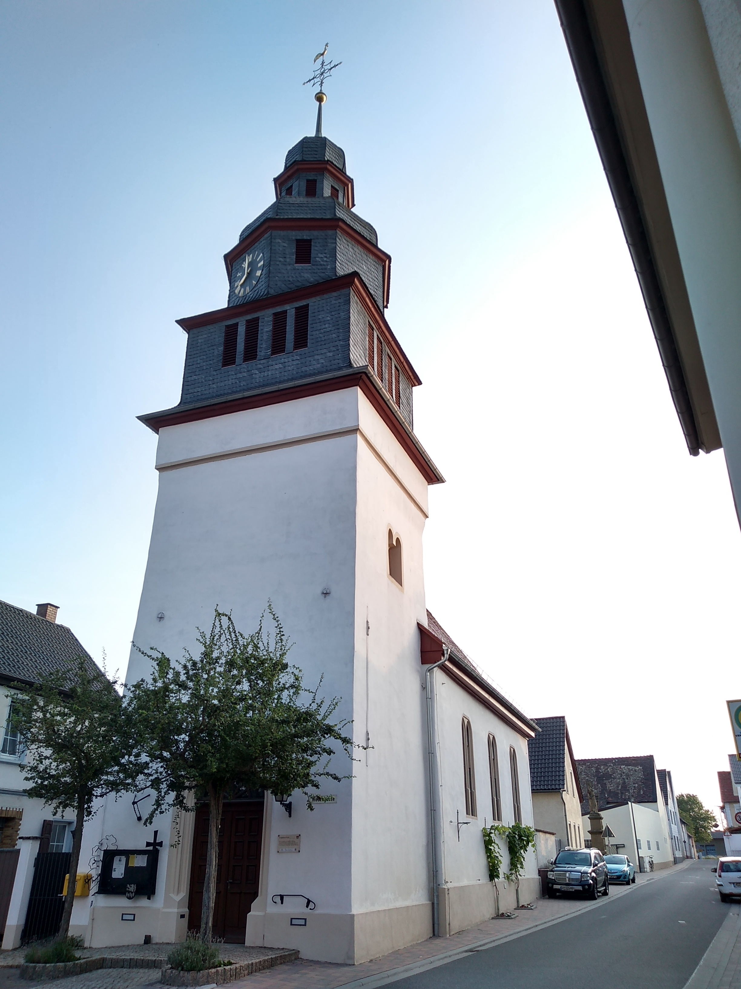 Evangelische Pfarrkirche, Weedegasse 1, an der Langgasse in Hochborn, Verbandsgemeinde Wonnegau, Landkreis Alzey-Worms, Rheinland-Pfalz, Deutschland. Kulturdenkmal gemäß Denkmalliste des Landes Rheinland-Pfalz (Stand: 31. Juli 2018). Bausubstanz ab 12. Jahrhundert, romanischer Chorturm (?), barocker Turmhelm, Saalbau 1618, Erweiterung 1857.